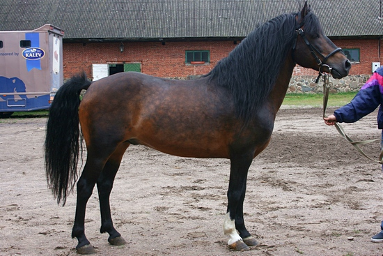 Estonian native horse stallion Viks